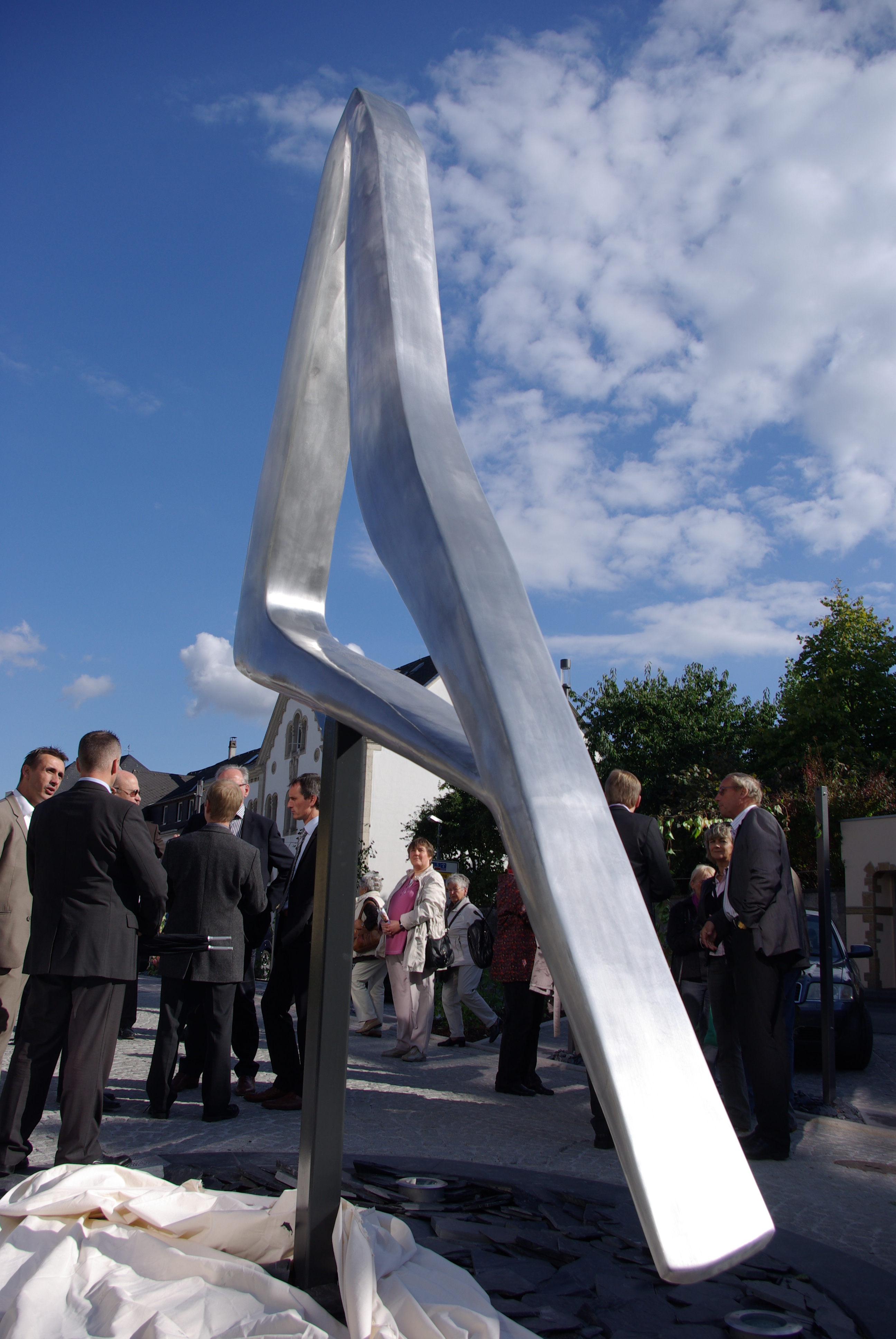 Enthüllung der Skulptur "Läufer" von Aloys Rump auf dem Bopparder Stadtplatz